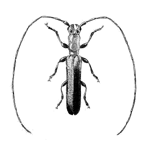 Phalota tenella (Pascoe, 1863)